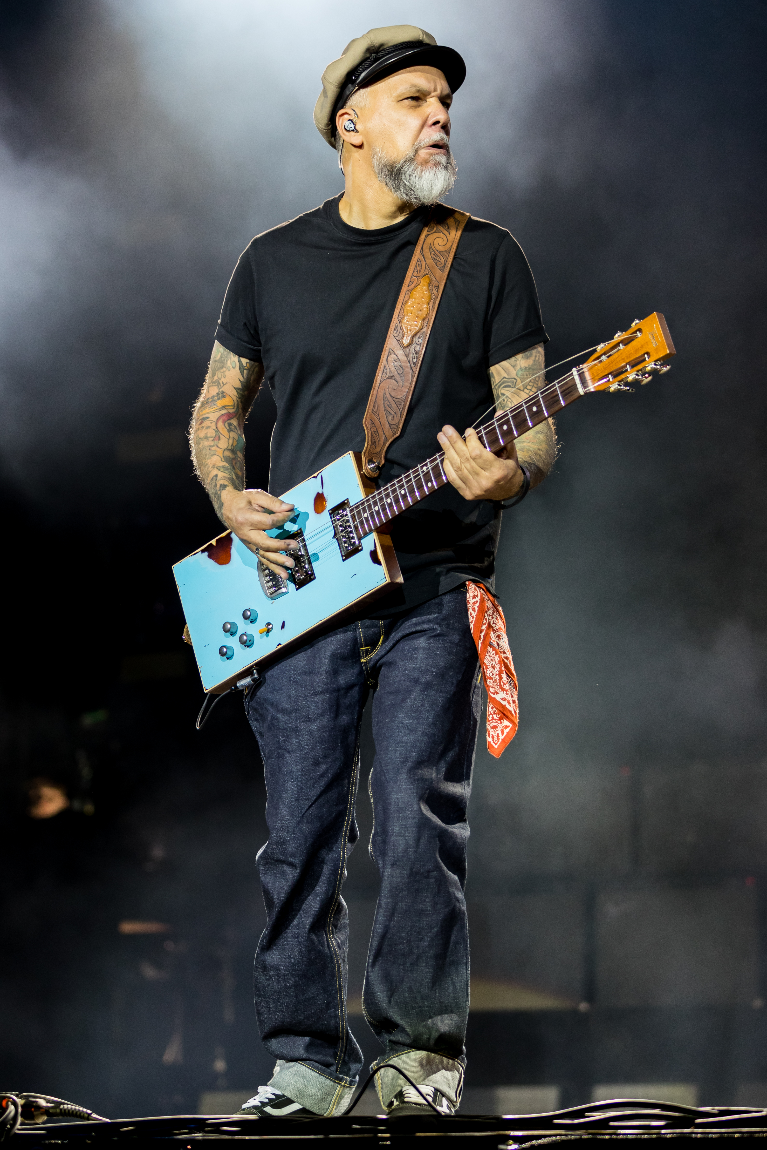 Böhse Onkelz during Werner Rennen at Flugplatz Hartenholm, Hasenmoor, Schleswig-Holstein, Germany on 2019-08-31, Photo: Sven Mandel